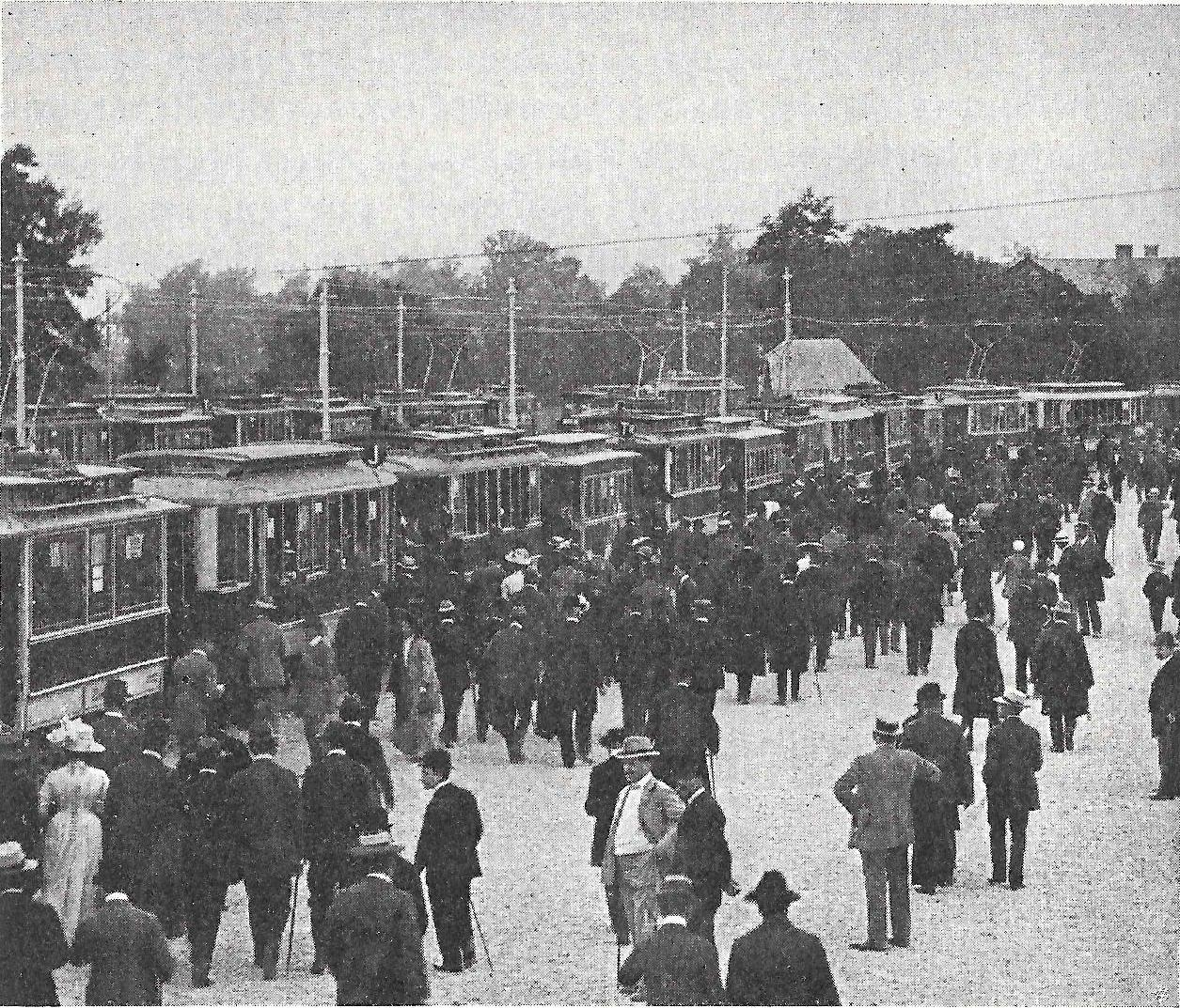 Die Entwicklung der städtischen Straßenbahnen im zehnjährigen Eigenbetriebe der Gemeinde Wien